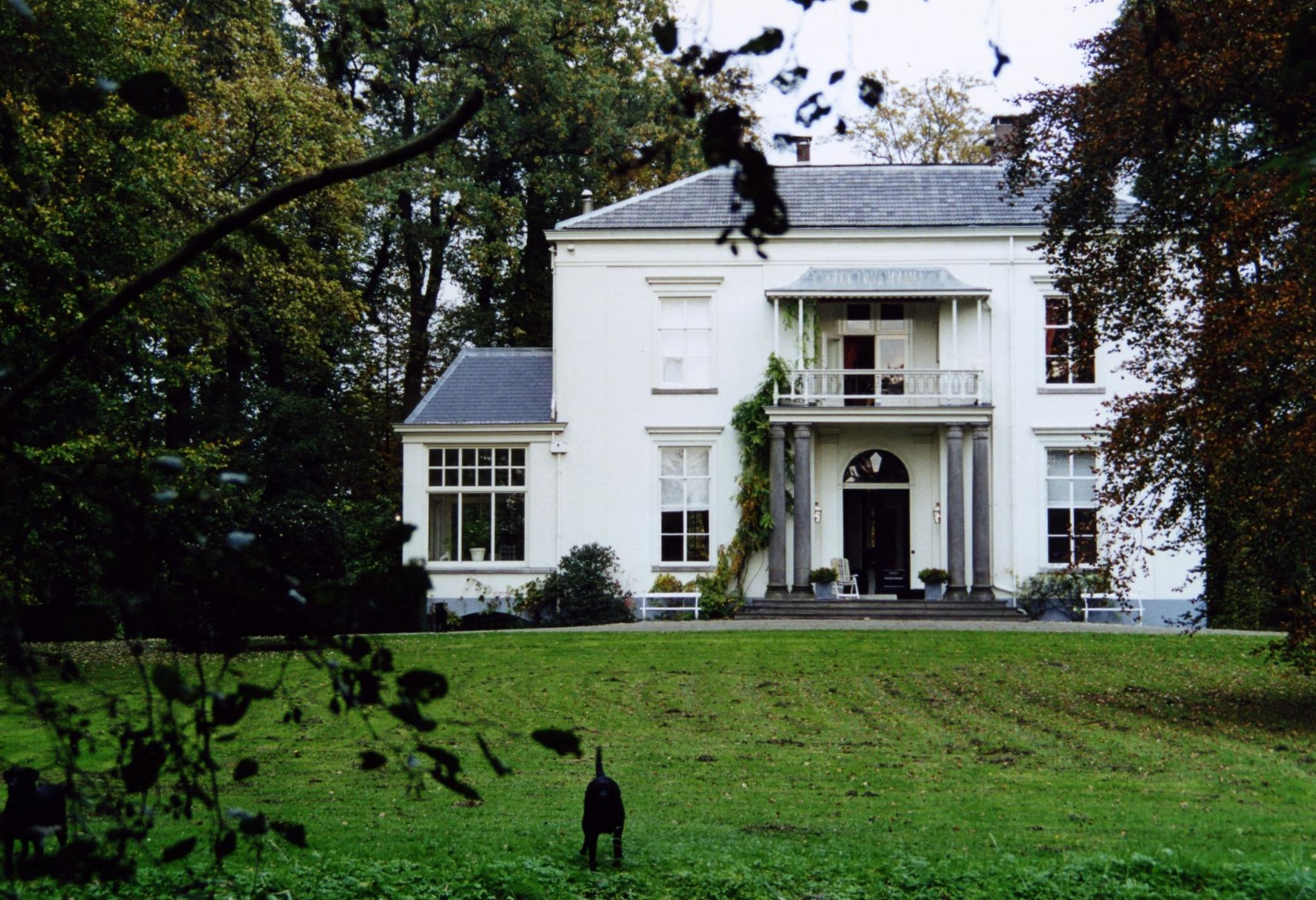 Voormalige ridderhofstad Blikkenburg te Zeist.